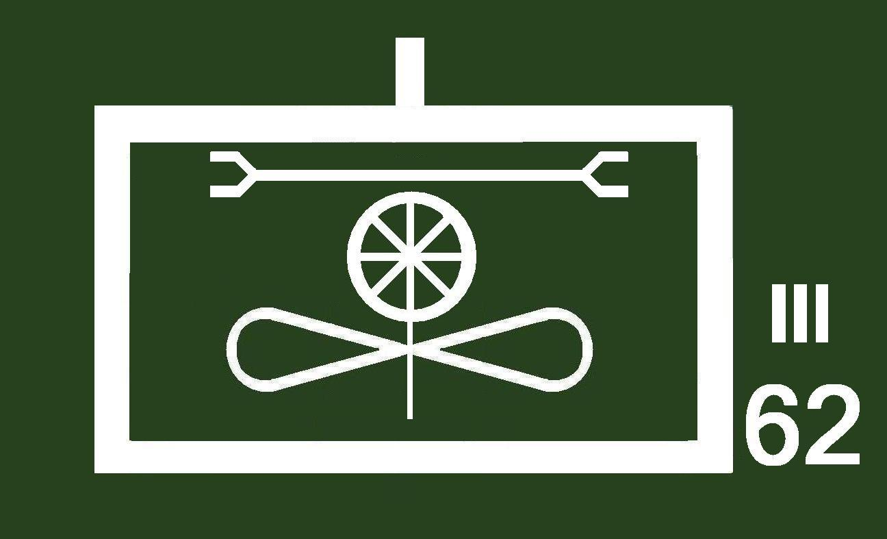 Lufttransportgeschwader 62 (LTG 62), Instandsetzungsstaffel, hier mit Staus einer Kompanie.